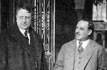 Randoph Hearst, magnat de la presse et producteur de cinéma en compagie de Robert G. Vignola réalisateur de cinéma.